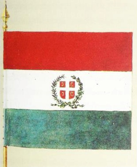 State Flag of Serbia (1835)